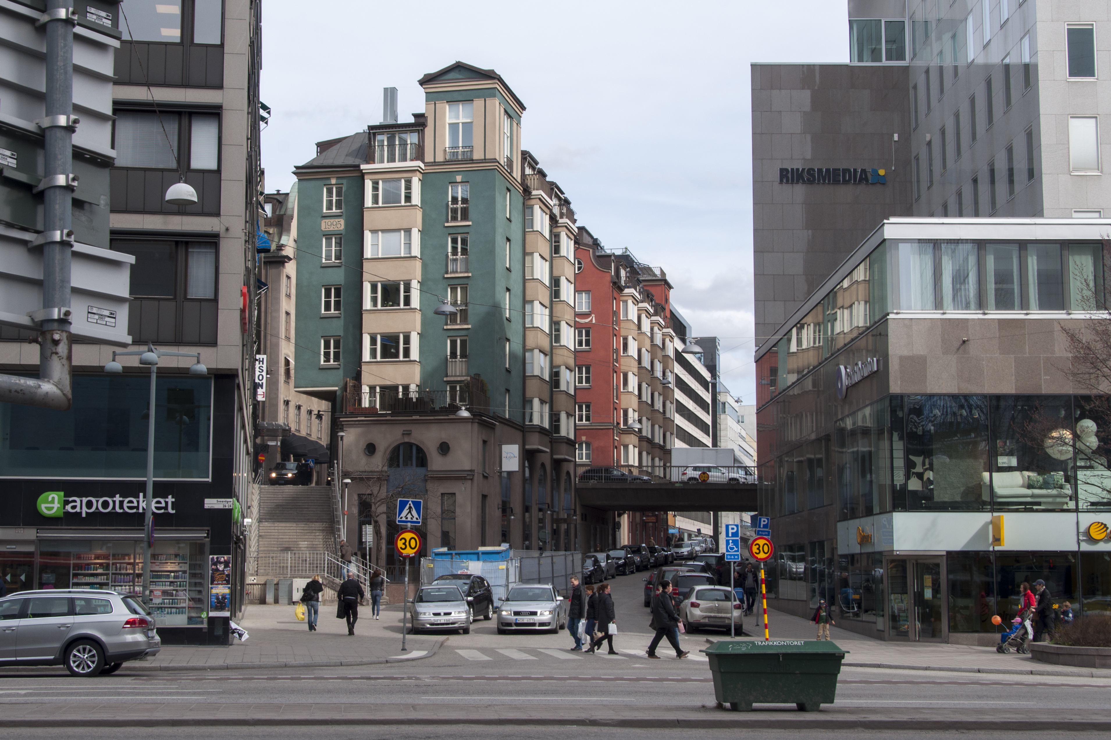 Oxtorgsgatan. Byggnader i kv. Oxkärran uppförda 1996. Arkitekt Sune Malmqvist